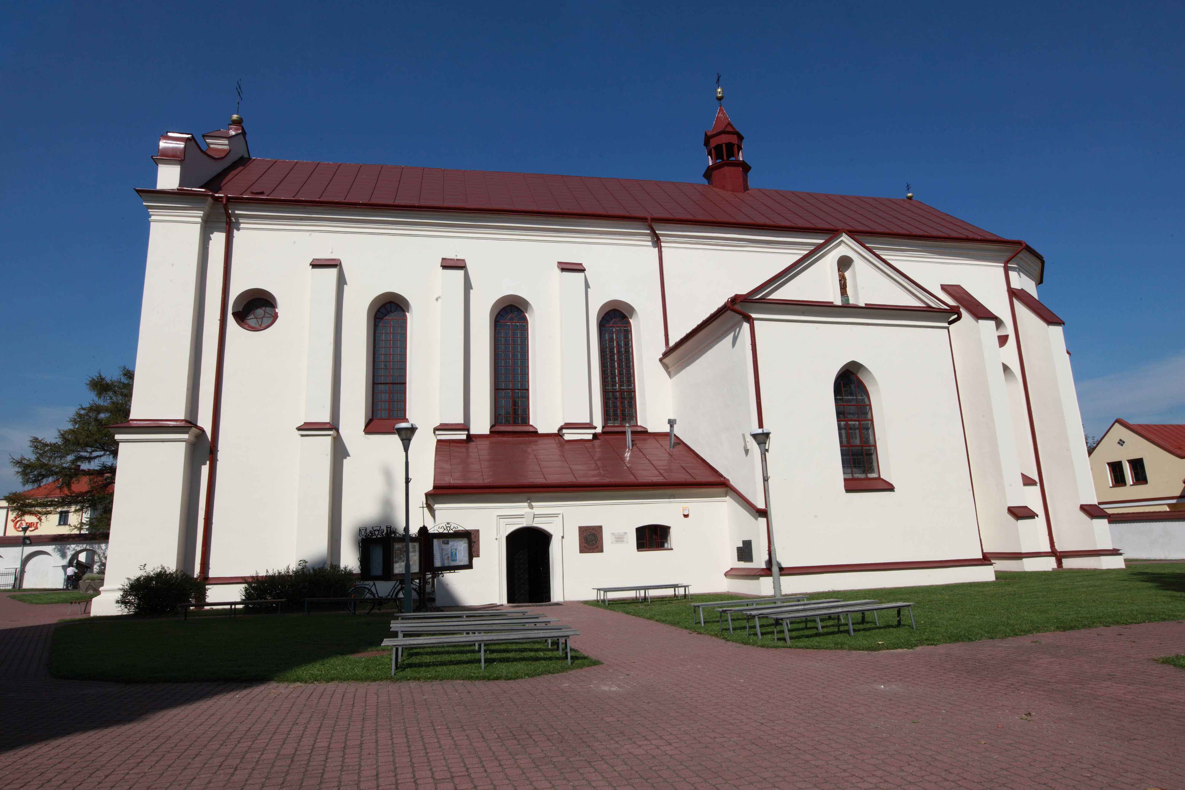 Leżajsk, kościół par. p.w. Św. Trójcy, 1616